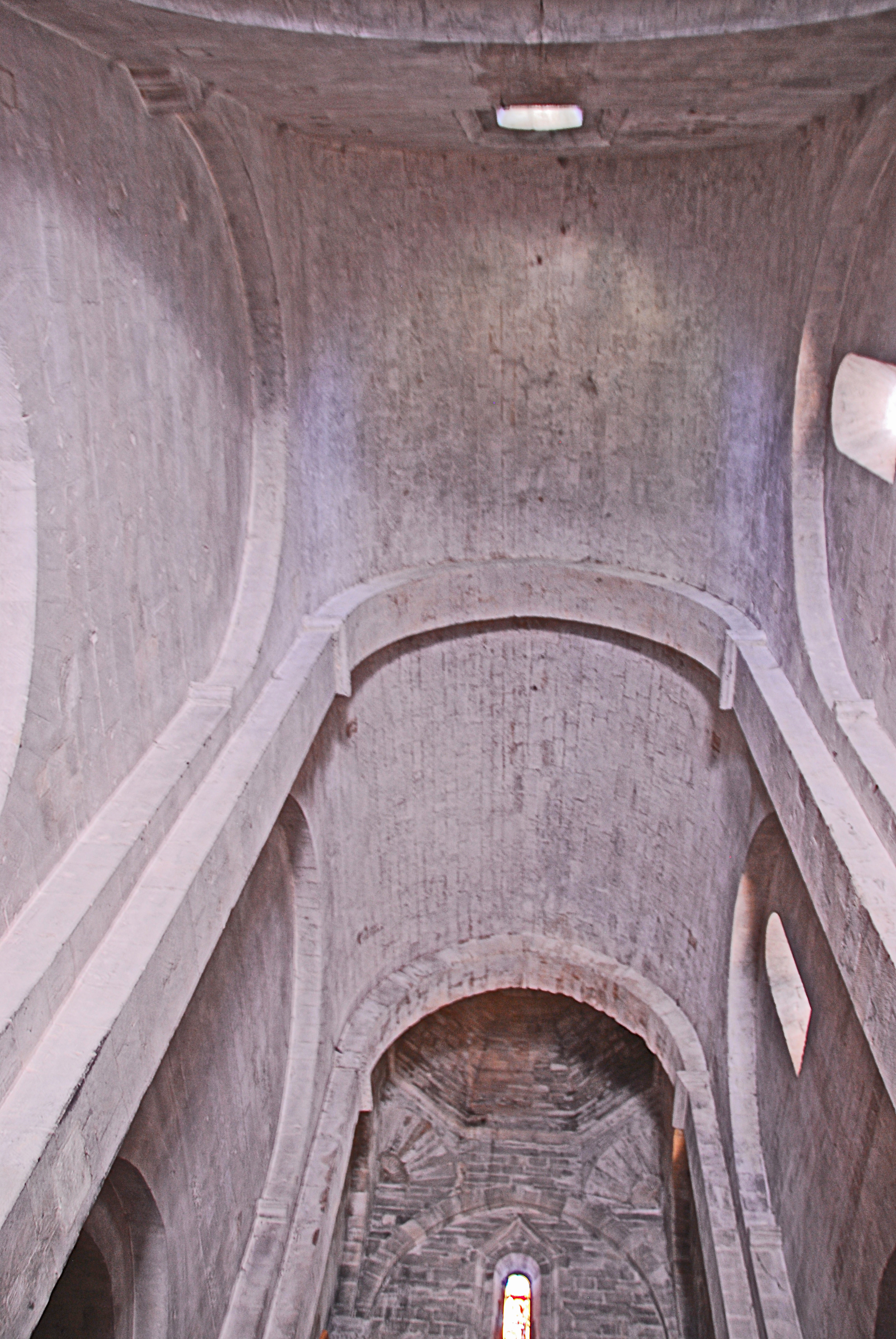 St-Michel de La Garde- Adhémar. Mittelschiffgewölbe